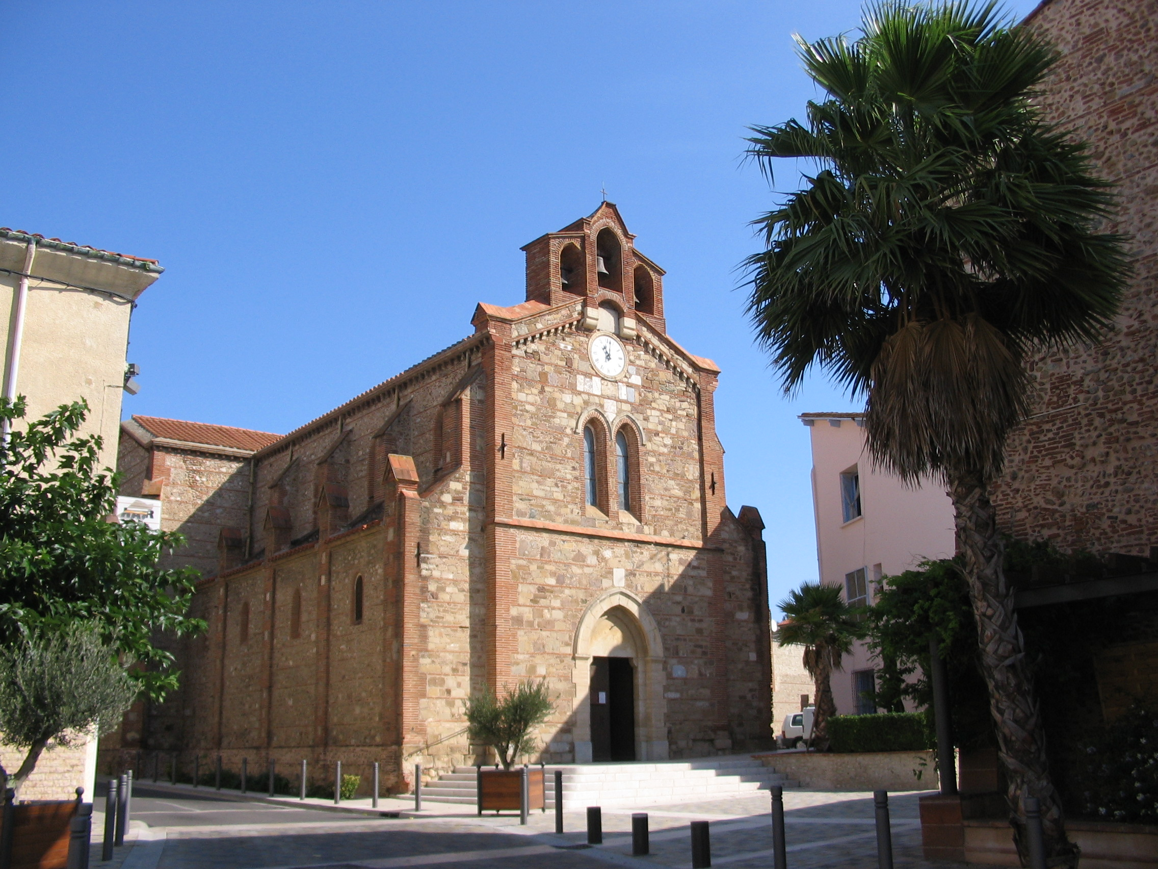 Eglise de St-Nazaire (Pyrénées Orientales)